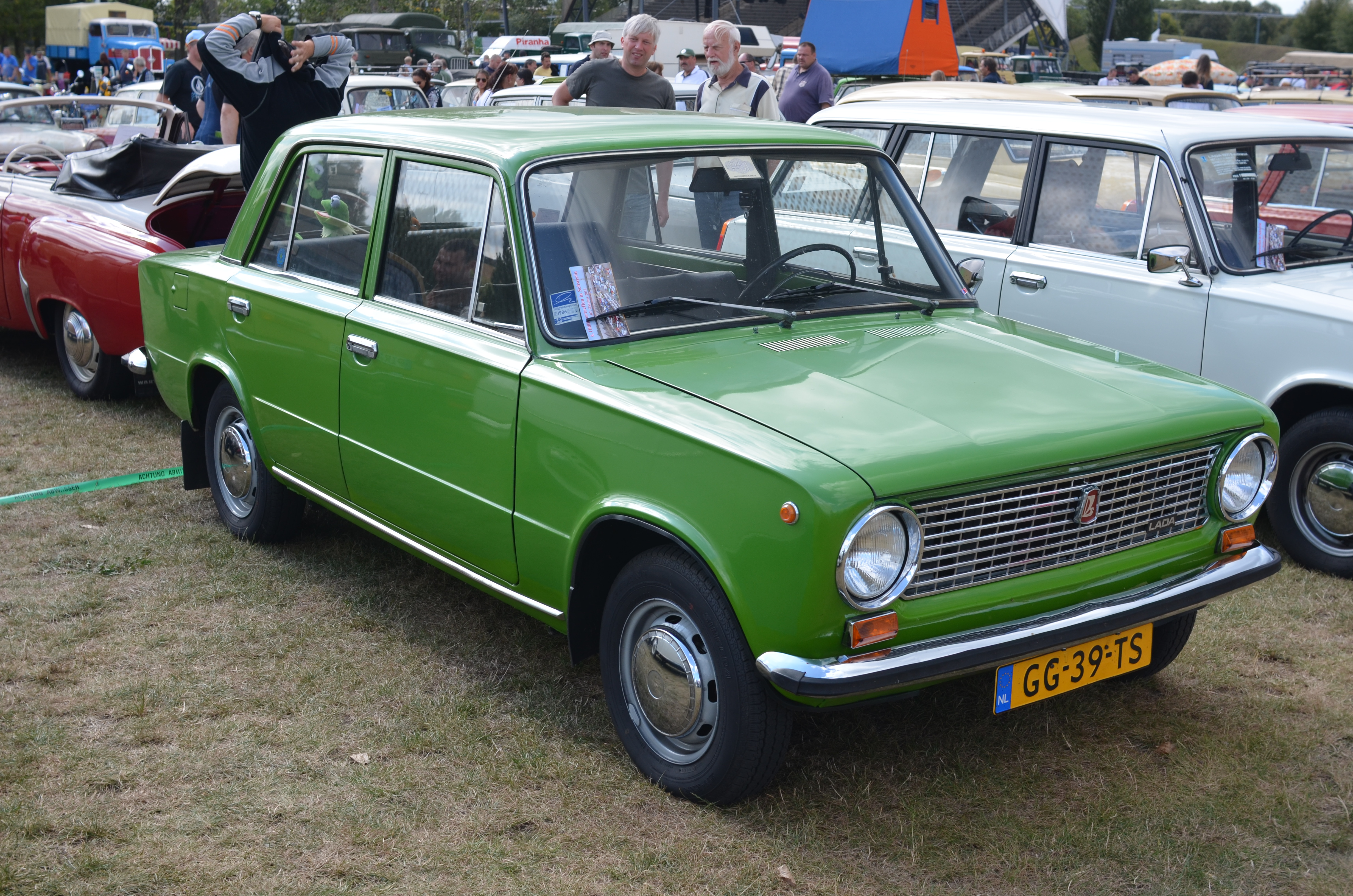 Lada 1200